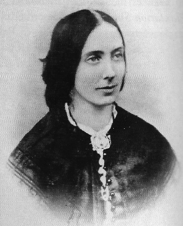 Jane Dziewicka (1826-1902) - z d. Jones, żona Seweryna Dziewickiego, nauczycielka